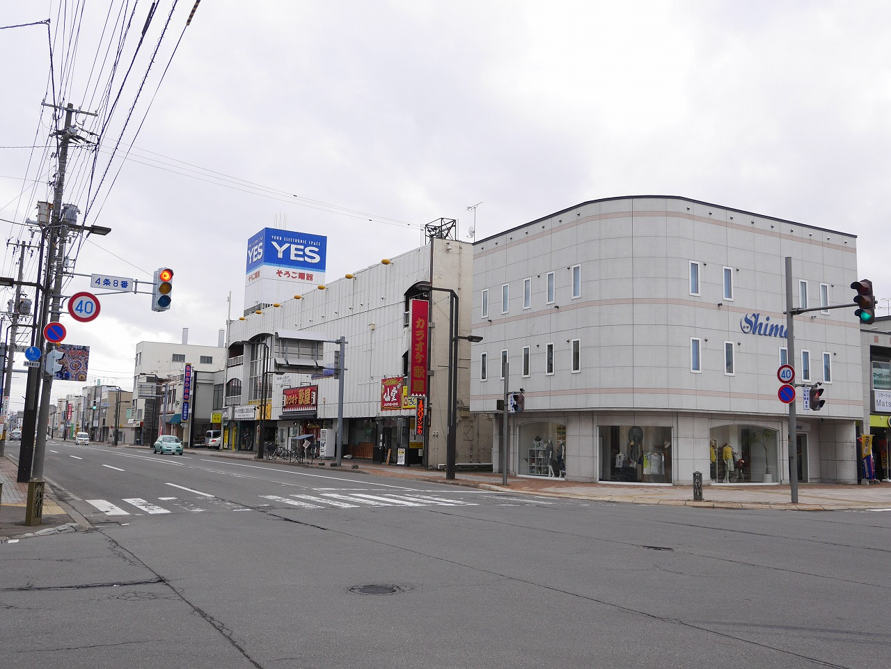 そうご電器旧深川店(2016年5月)